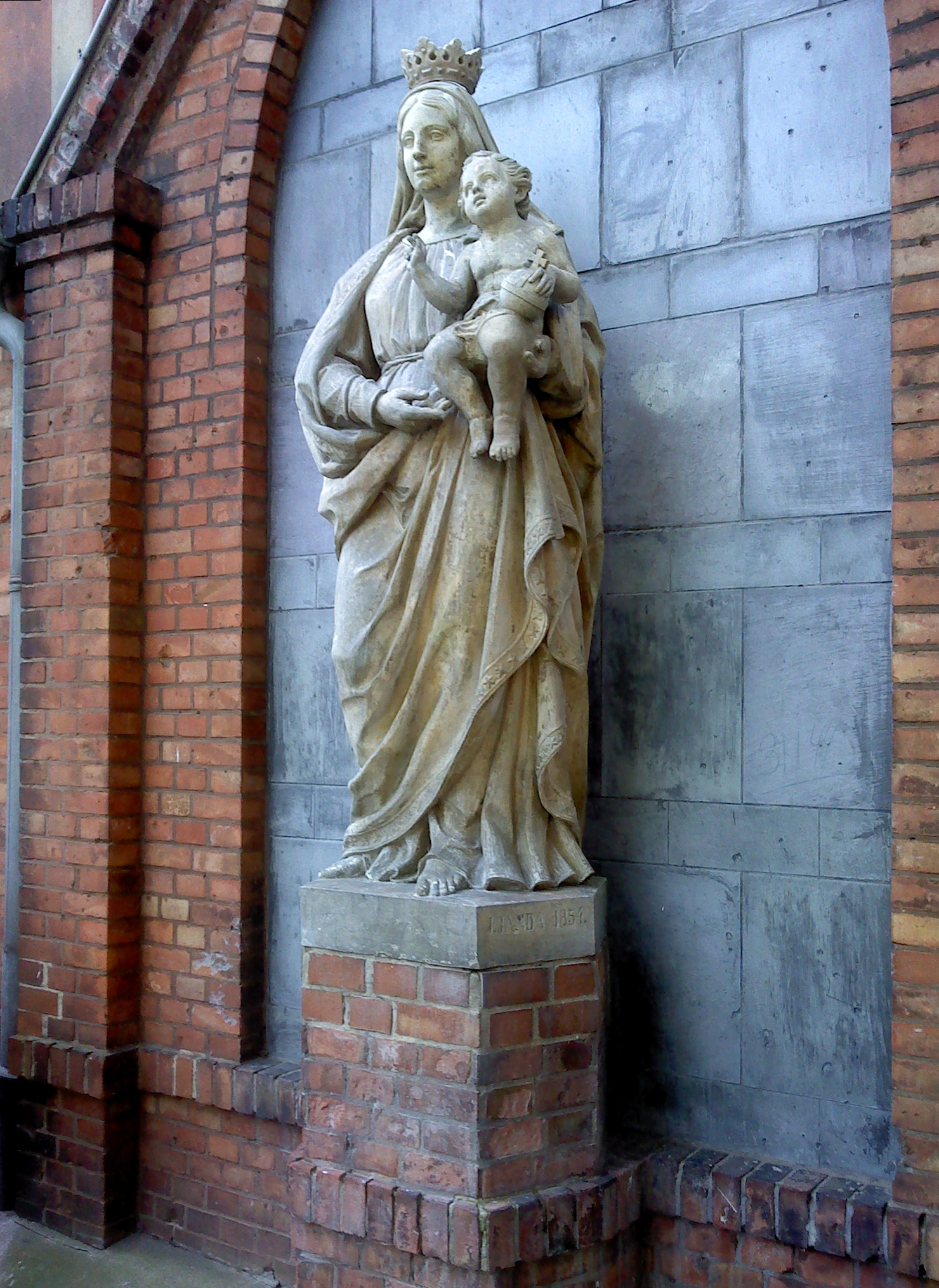 St. Hedwig-Krankenhaus: Marienstatue an der Promenade im "historischen Innenhof"